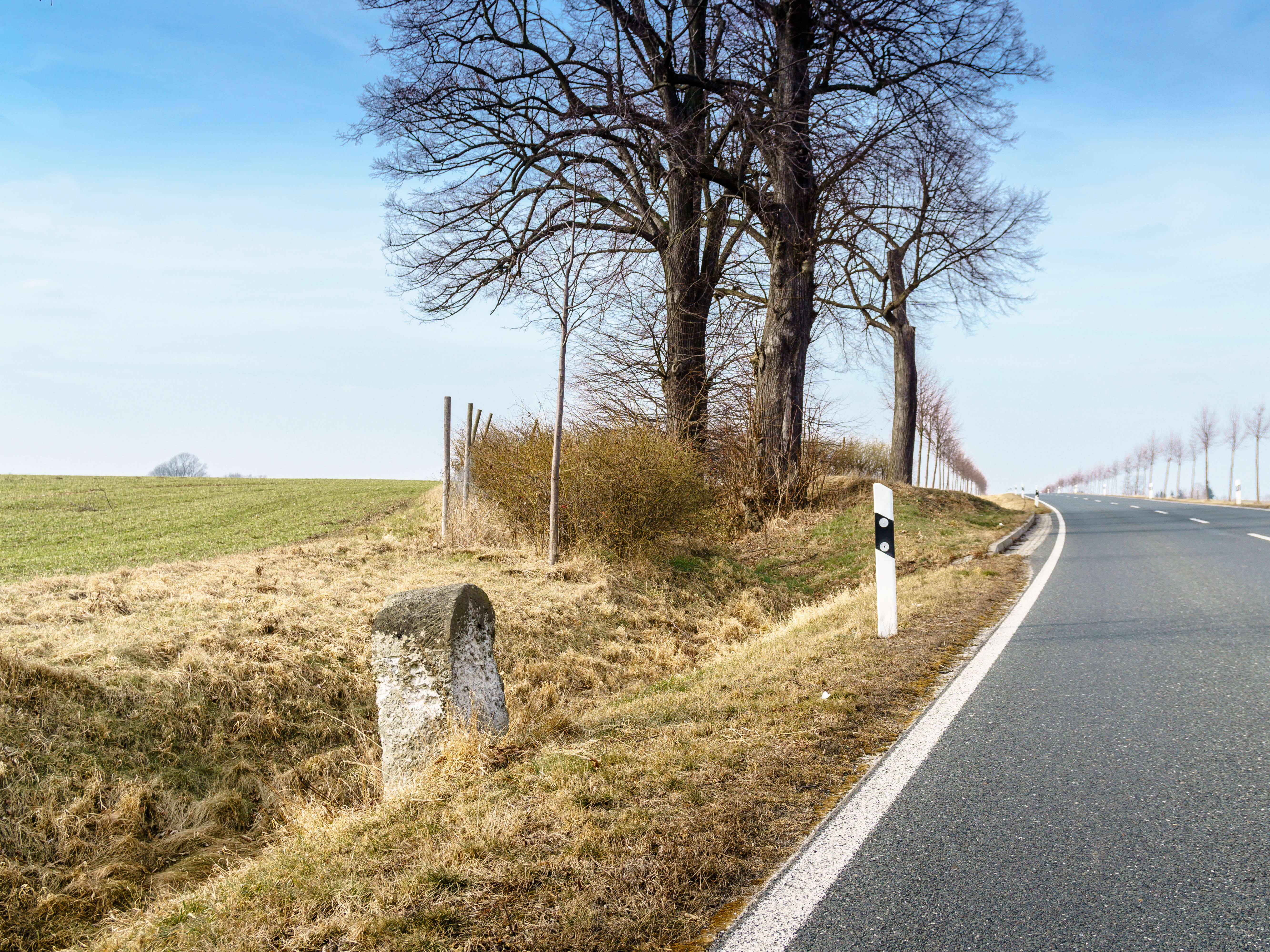 Kilometerstein an der S 49, Fl-stck. 386/1 südlich von Bad Lausick OT Lauterbach